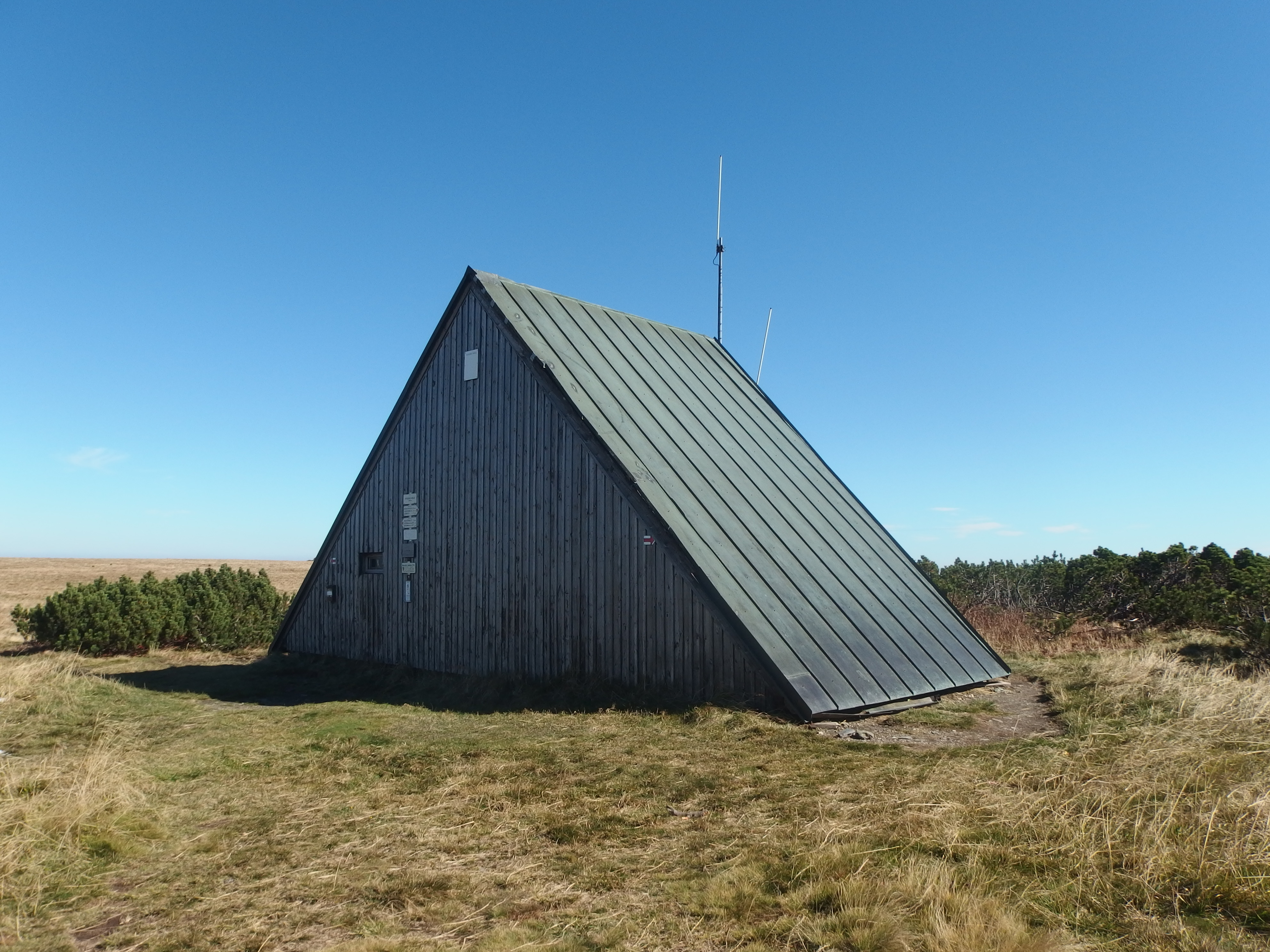 Hrubý Jeseník, Vysoká hole (1462 m).